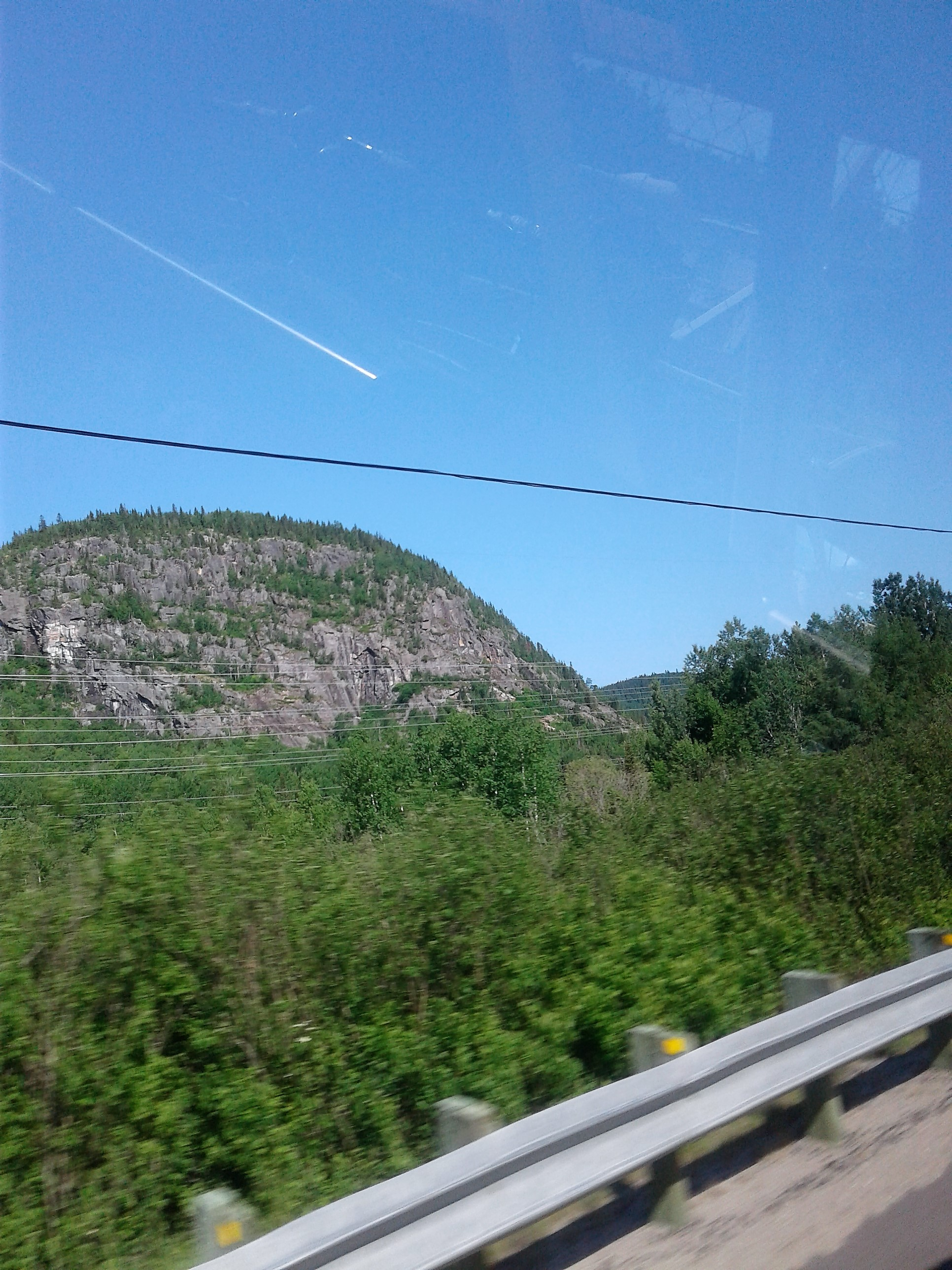 Vue de la route 170 à Saint-Siméon, Charlevoix-Est, Québec